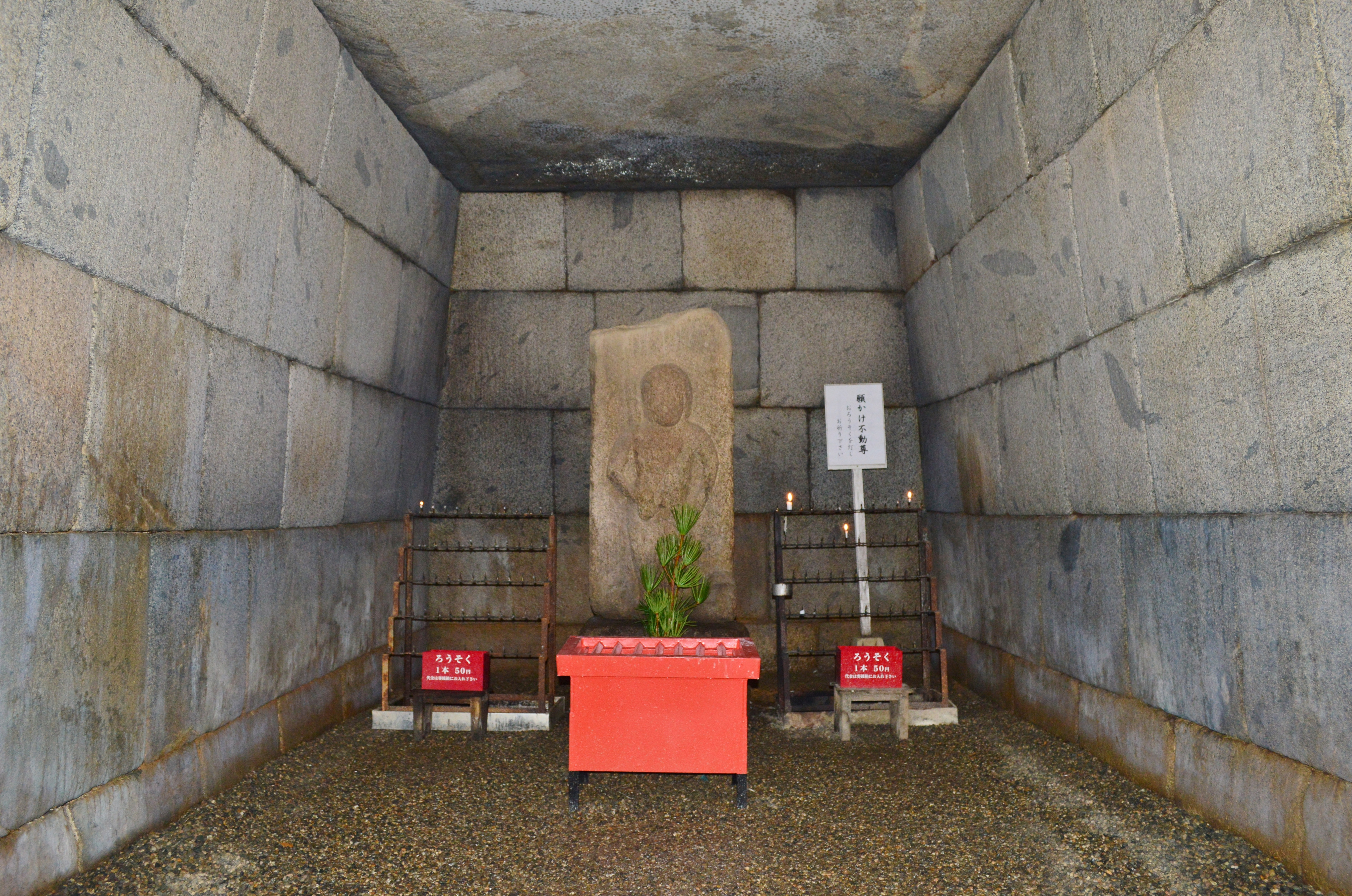 文殊院西古墳 石室玄室